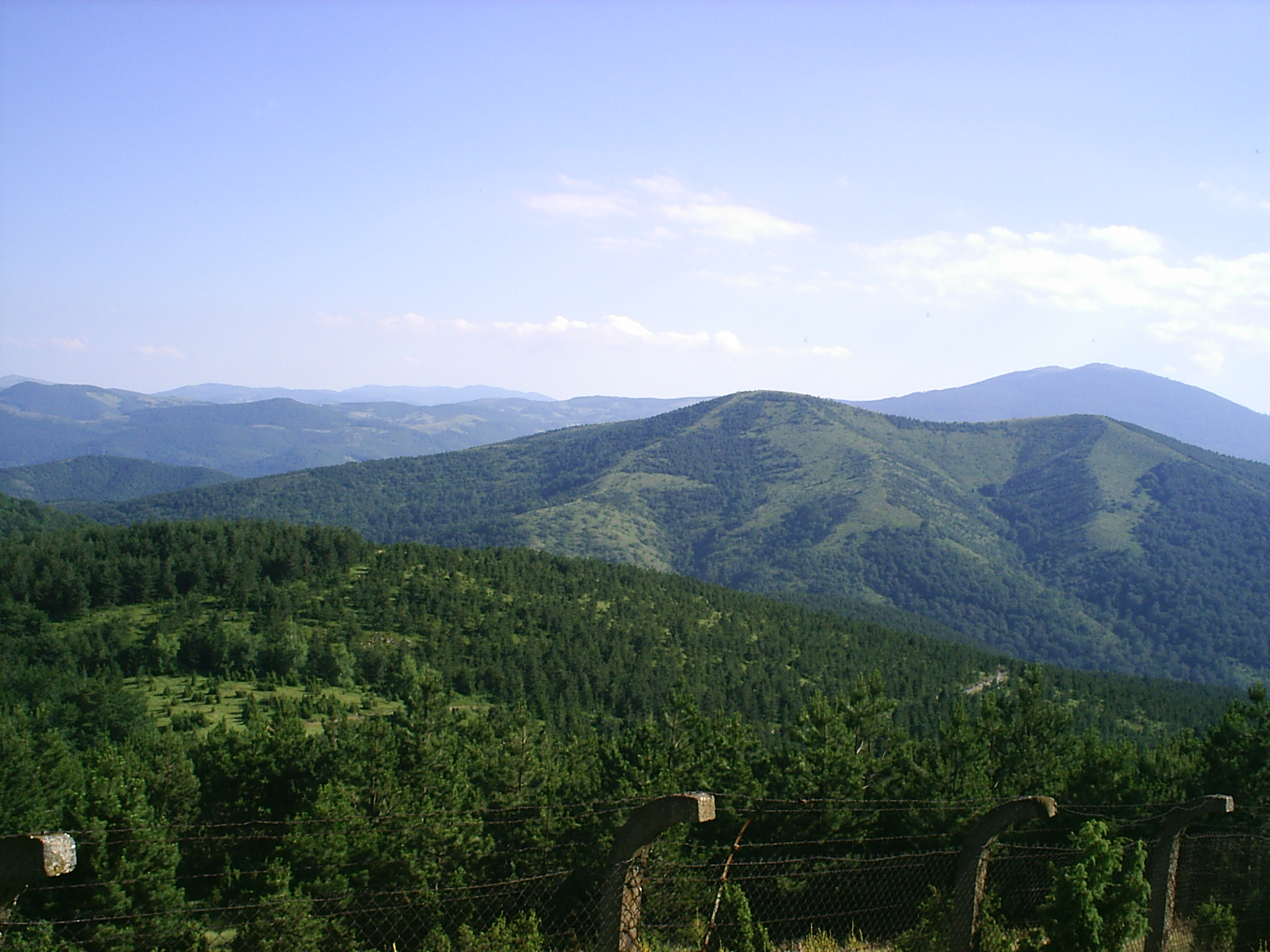 Goč